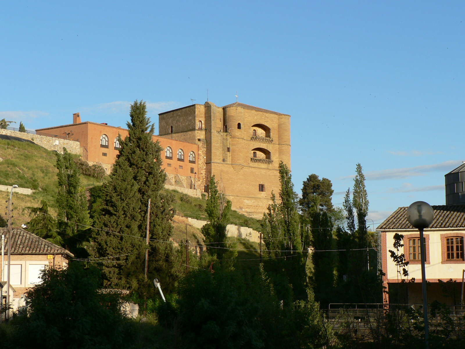 Torre del Caracol de Benavente (Zamora). Actual parador nacional. --Achica 02:05 2 jun, 2005 (CEST) Simple y llanamente hecha con mi cámara.